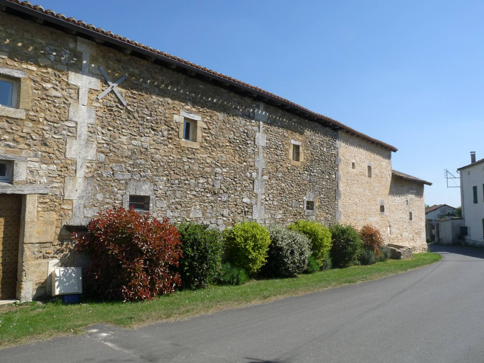 Eglise de Rozet, Combiers, Charente, France